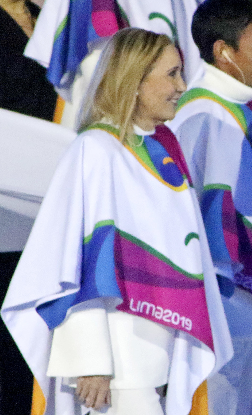 Ceremonia de inauguración de los Juegos Panamericanos Lima 2019